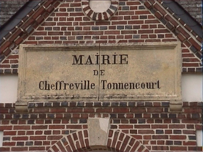 Fronton de la mairie de Cheffreville-Tonnencourt